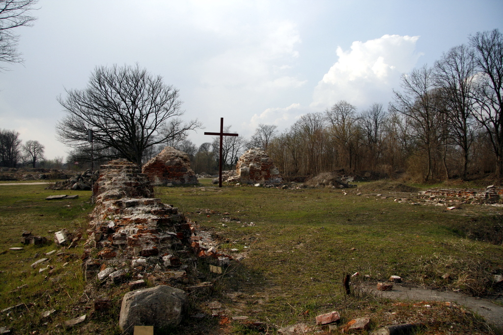 Kostrzyn nad Odrą, Old Town, Poland